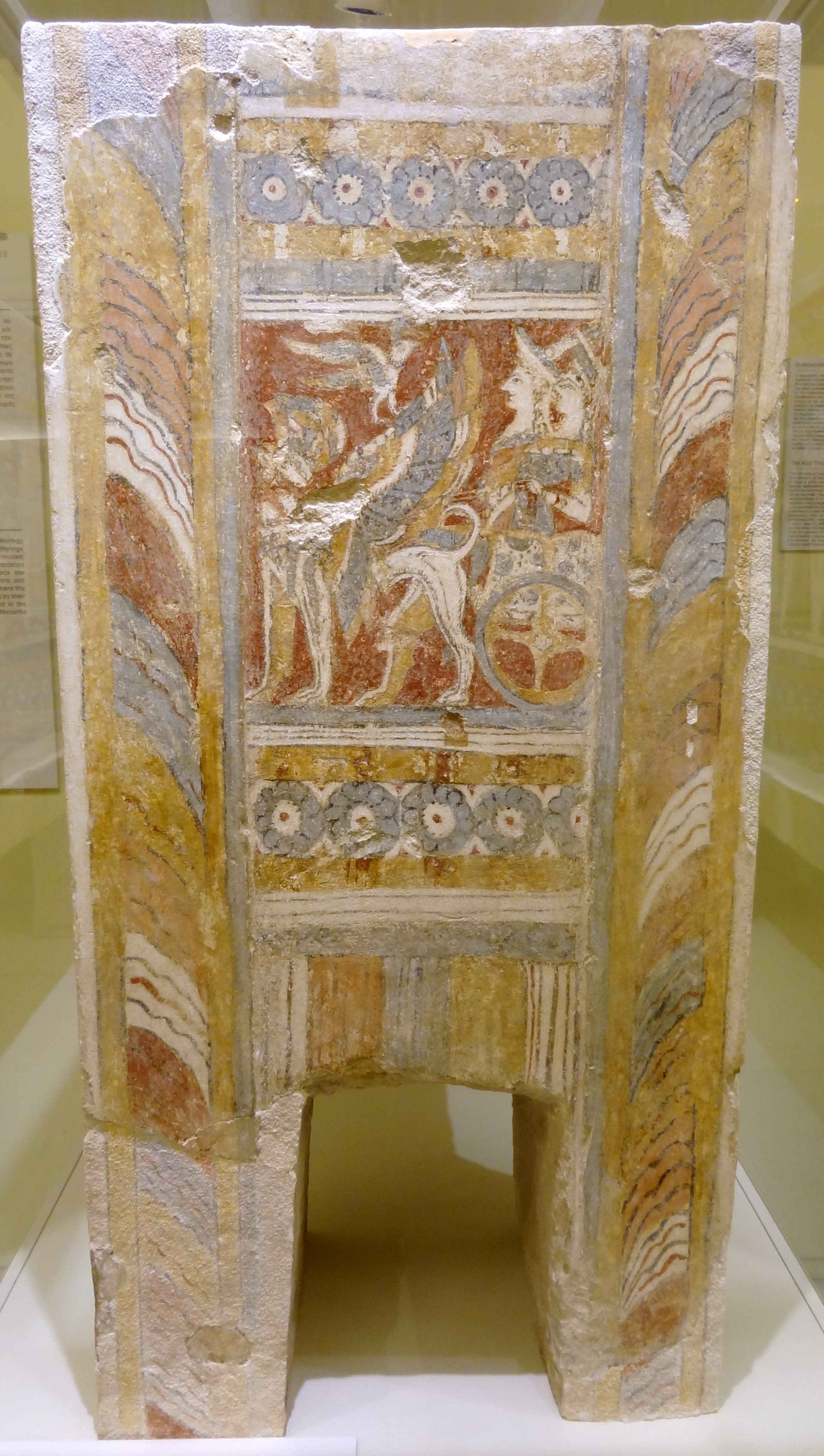 Sarkophag von Agia Triada (14. Jahrhundert v. Chr.), ausgestellt im Archäologischen Museum Iraklio, Kreta, Griechenland